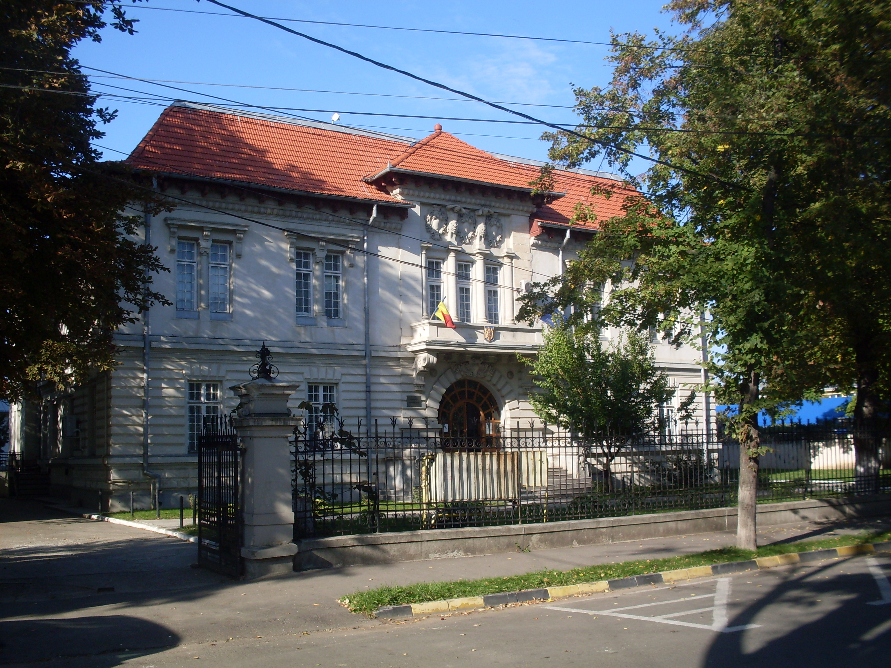 Fostul sediu al Administrației Financiare, azi Tribunalul Tecuci